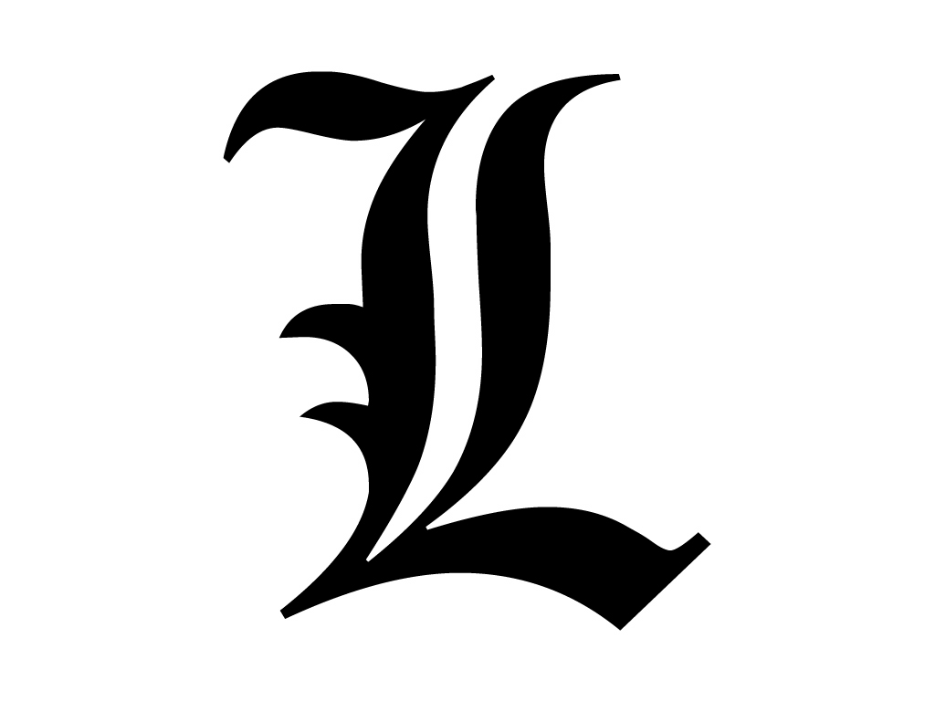 DEATH NOTE - L's Wallpaper